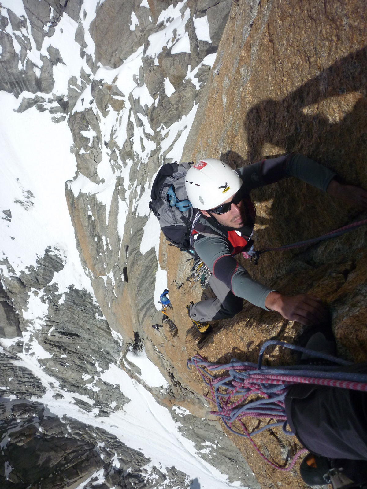 Voie des suisses: avant le toit noir